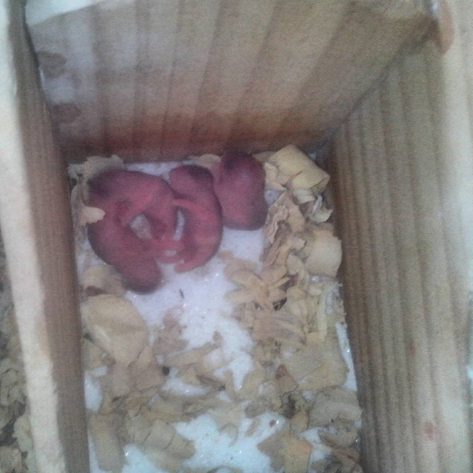 Bầy hamster con khi đạt 5 ngày tuổi.